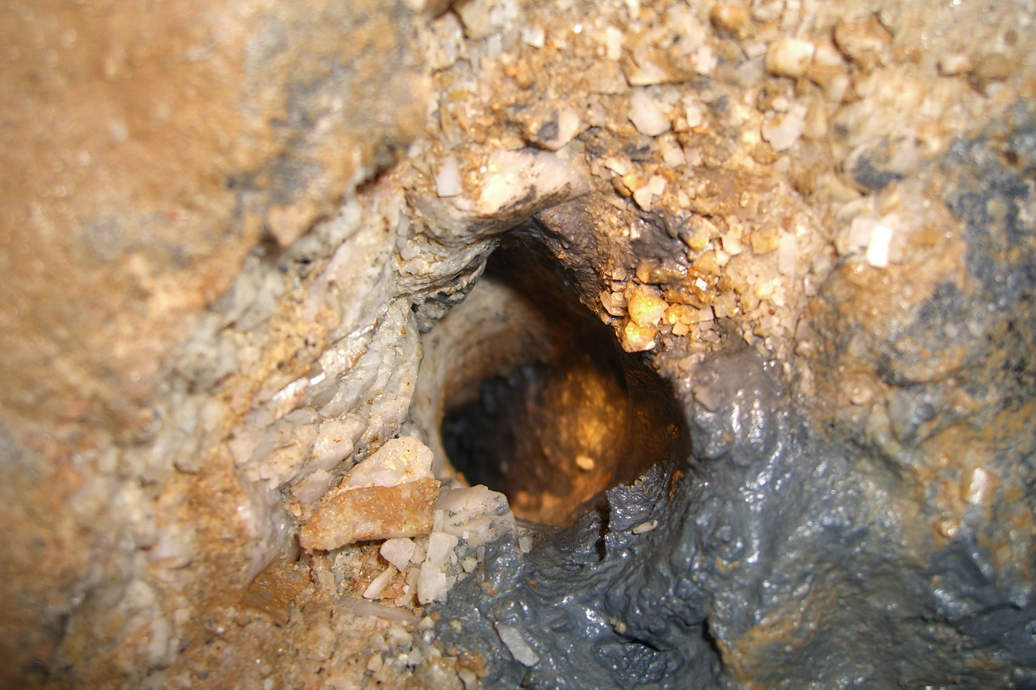 Bohrpfeife (gemeißeltes Sprengloch) aus vorderösterreicher Zeit mit Schwarzpulverresten, da Schuß (Sprengung) nicht zündete. Silberbergwerk Suggental bei Waldkirch